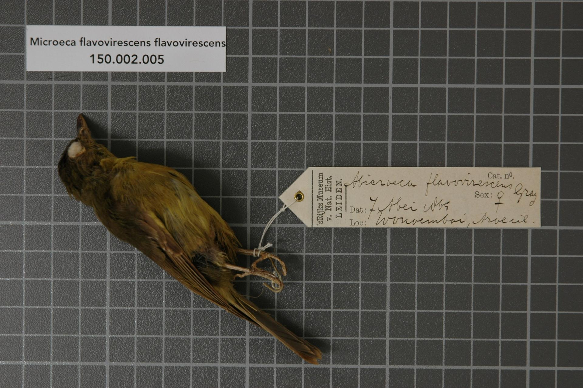 Microeca flavovirescens flavovirescens Gray, 1858